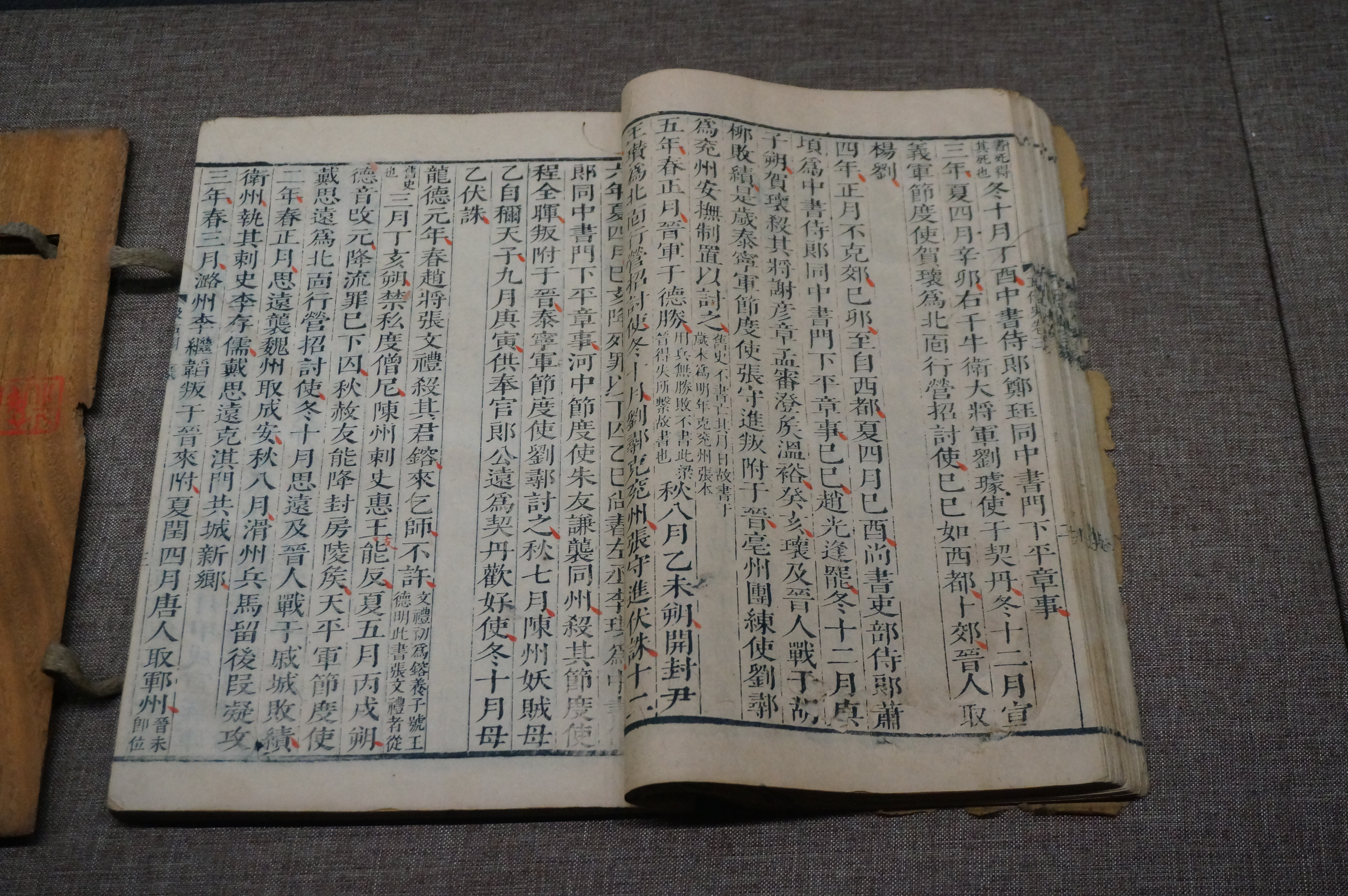 明代毛氏汲古阁刻本《欧阳修五代史》（《新五代史》），此页为卷三·梁本纪第三，武义博物馆藏。